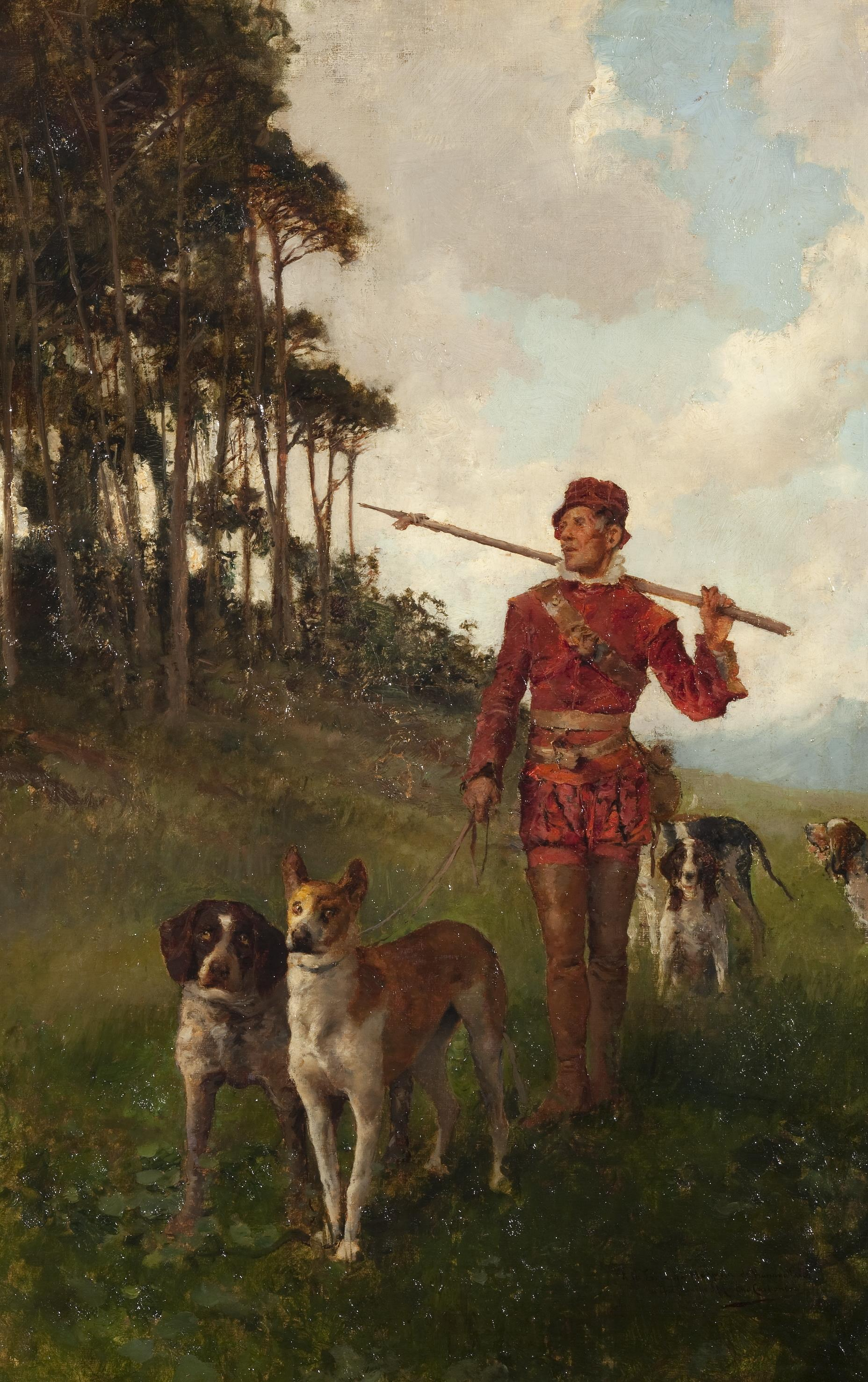 La obra representa probablemente un pasaje de la novela Gil Blas, que fue escrita a principios del siglo XVIII por el novelista y dramaturgo francés Alain-René Lesage.